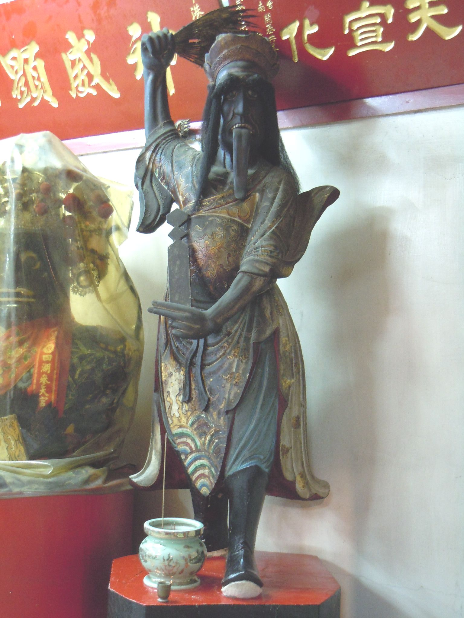 中文（台灣）: 白無常名為「謝必安」，身材高瘦，面白，台灣人尊之曰「七爺」。